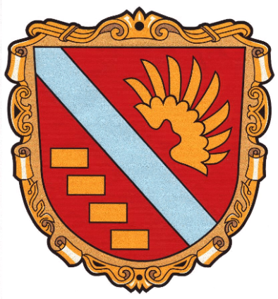 Wappen von Ziegelheim (Thüringen)